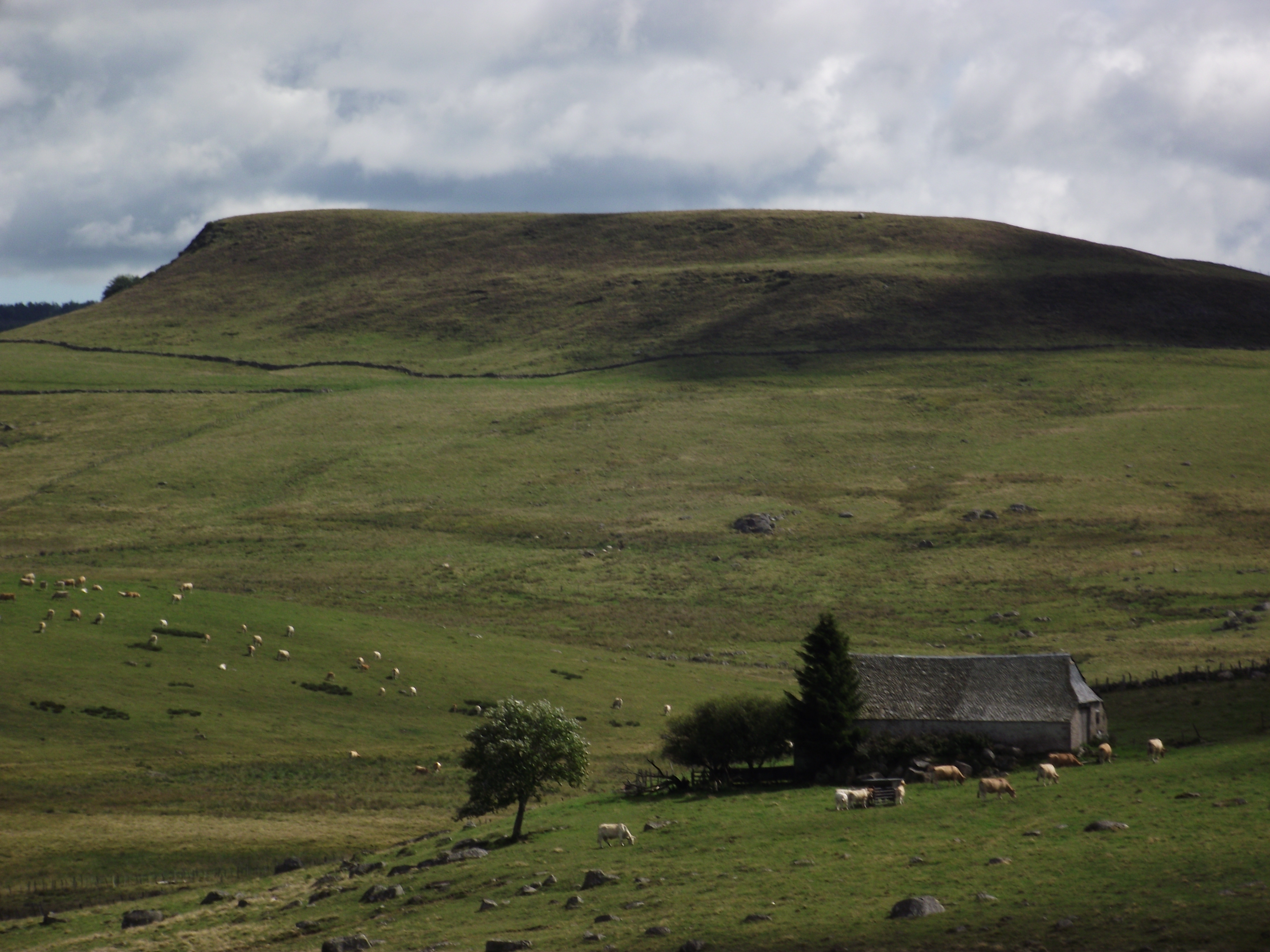 Le truc de l'Agullio (1284 m) dans la partie nord de l'Aubrac (commune de St Urcize).